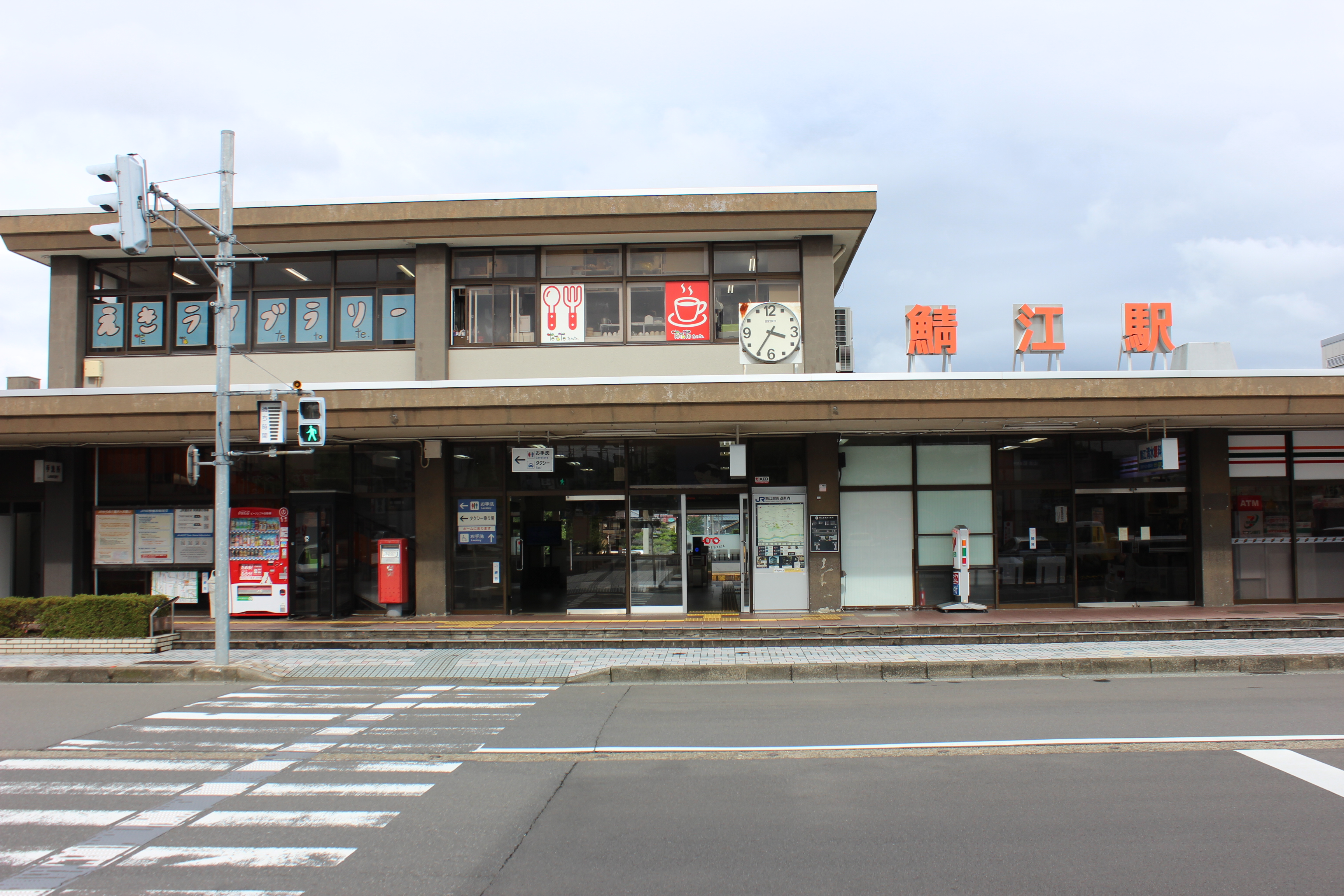 鯖江駅（福井県鯖江市） Canon EOS Kiss X5